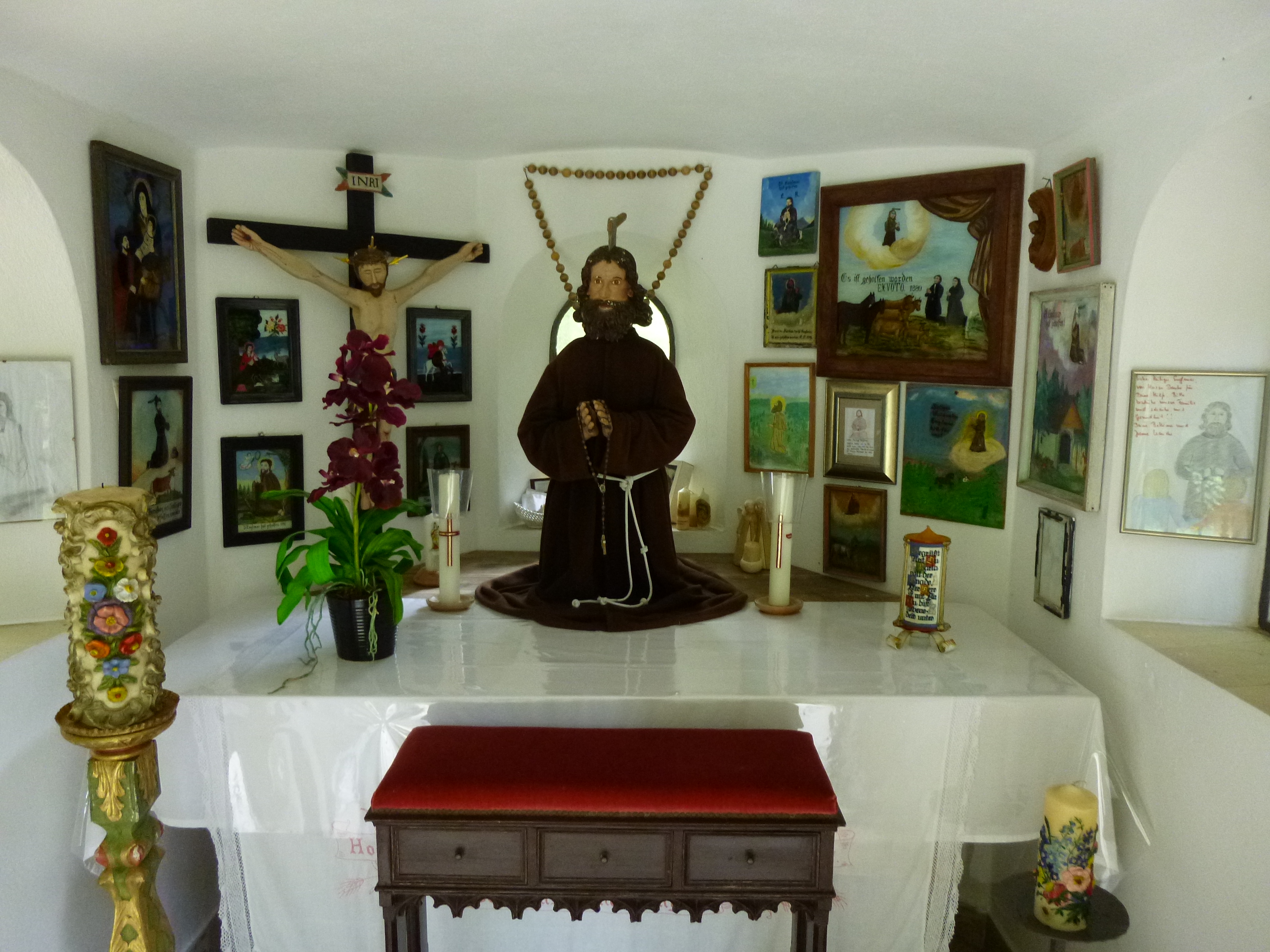 Innenansicht der Kapelle Weiße Marter beim Mühlberg, Sankt Englmar. Liste der Baudenkmäler in Sankt Englmar.